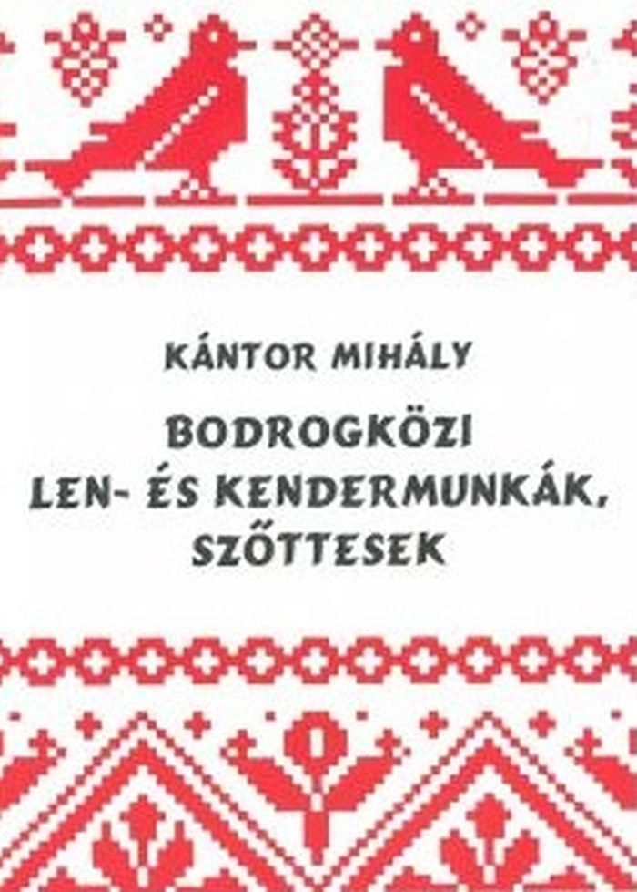 Kántor Mihály (1885-1968) "Bodrogközi len- és kendermunkák" című 2002-es újrakíadott könyvének borítója. Az eredeti kiadás 1961-ben jelent meg.